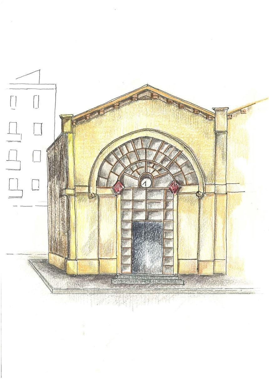 Vista de la façana d'entrada del l'antic Mercat de les Mandongueres. Atribuit a l'Arquitecte Ignasi Oms i Ponsa.